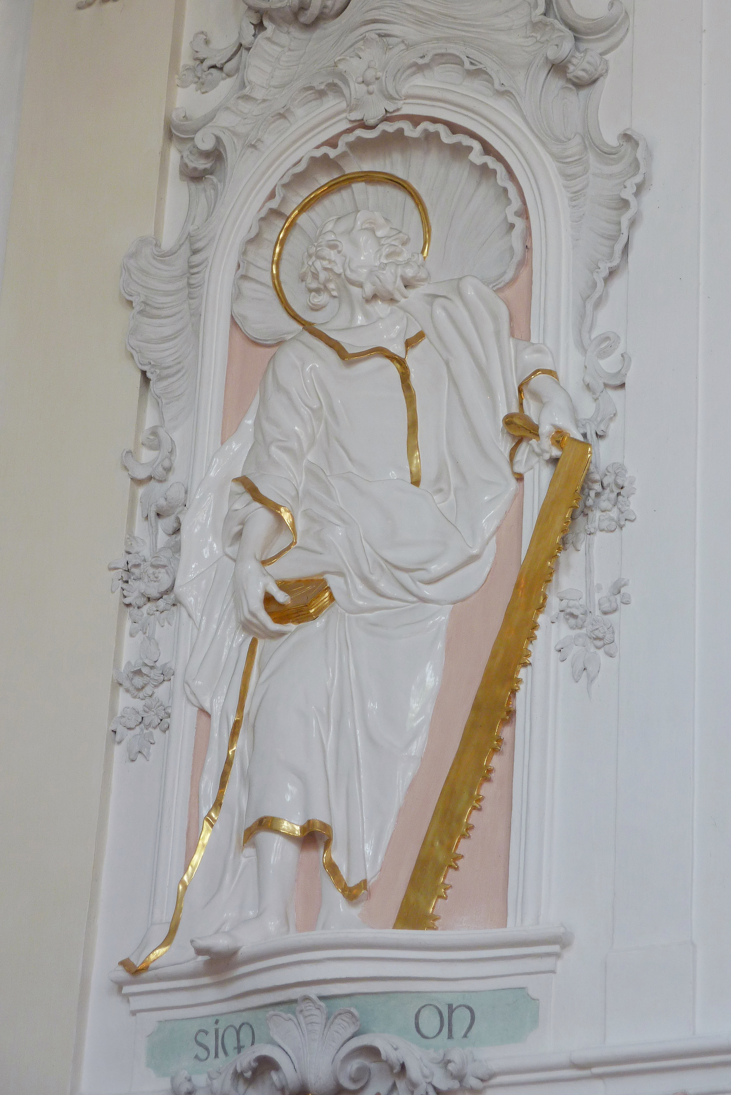 Katholische Pfarrkirche St. Georg in Westendorf, einer Gemeinde im Landkreis Augsburg (Bayern), Stuck von Johann und Ignaz Finsterwalder, mit Farbfassung von Johann Jacob Schubarth (1740), Darstellung: Apostel Simon (mit Säge)